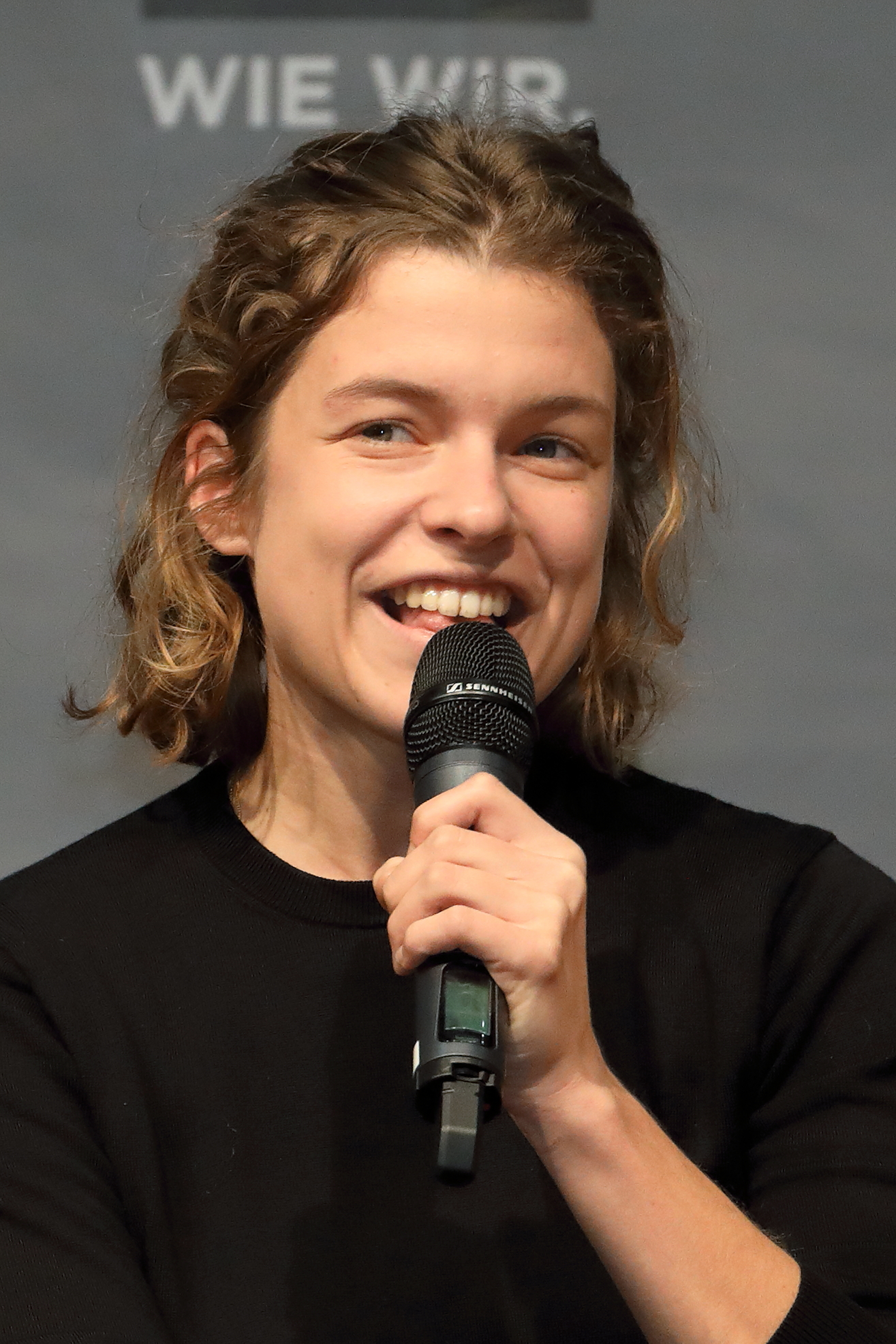 Die österreichische Autorin Marie Gamillscheg und Gewinnerin des Österreichischen Buchpreises 2018 in der Kategorie Debütpreis auf der ORF-Bühne der Wiener Buchmesse 2018.